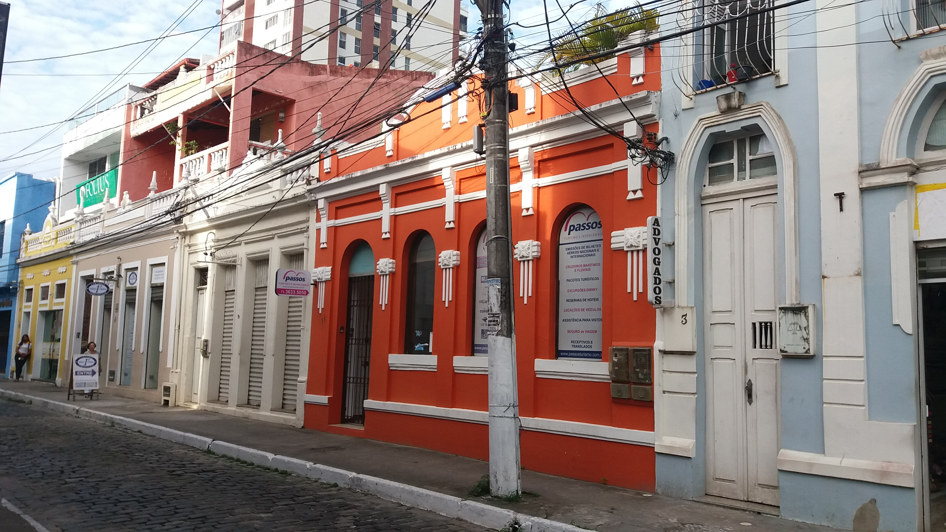 Conjunto arquitetônico da rua Conselheiro Saraiva, atual rua Antonio Lavigne de Lemos, Ilhéus, Bahia, Brasil.